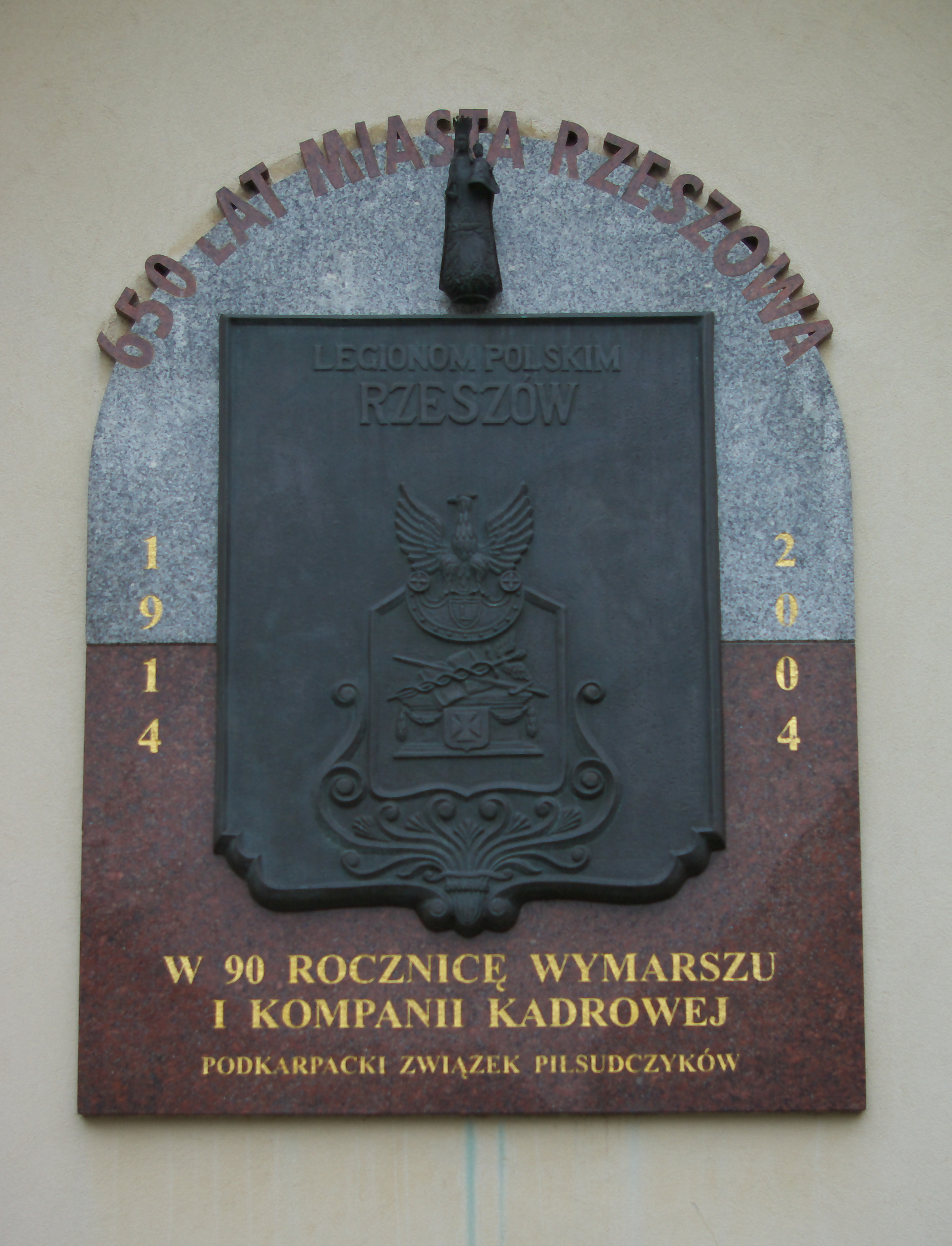 Tablica upamiętniająca 650-lecie Rzeszowa i 90. rocznicę wymarszu I Kompanii Kadrowej ustanowiona na fasadzie dzwonnicy kościoła farnego św. Wojciecha i św. Stanisława w Rzeszowie